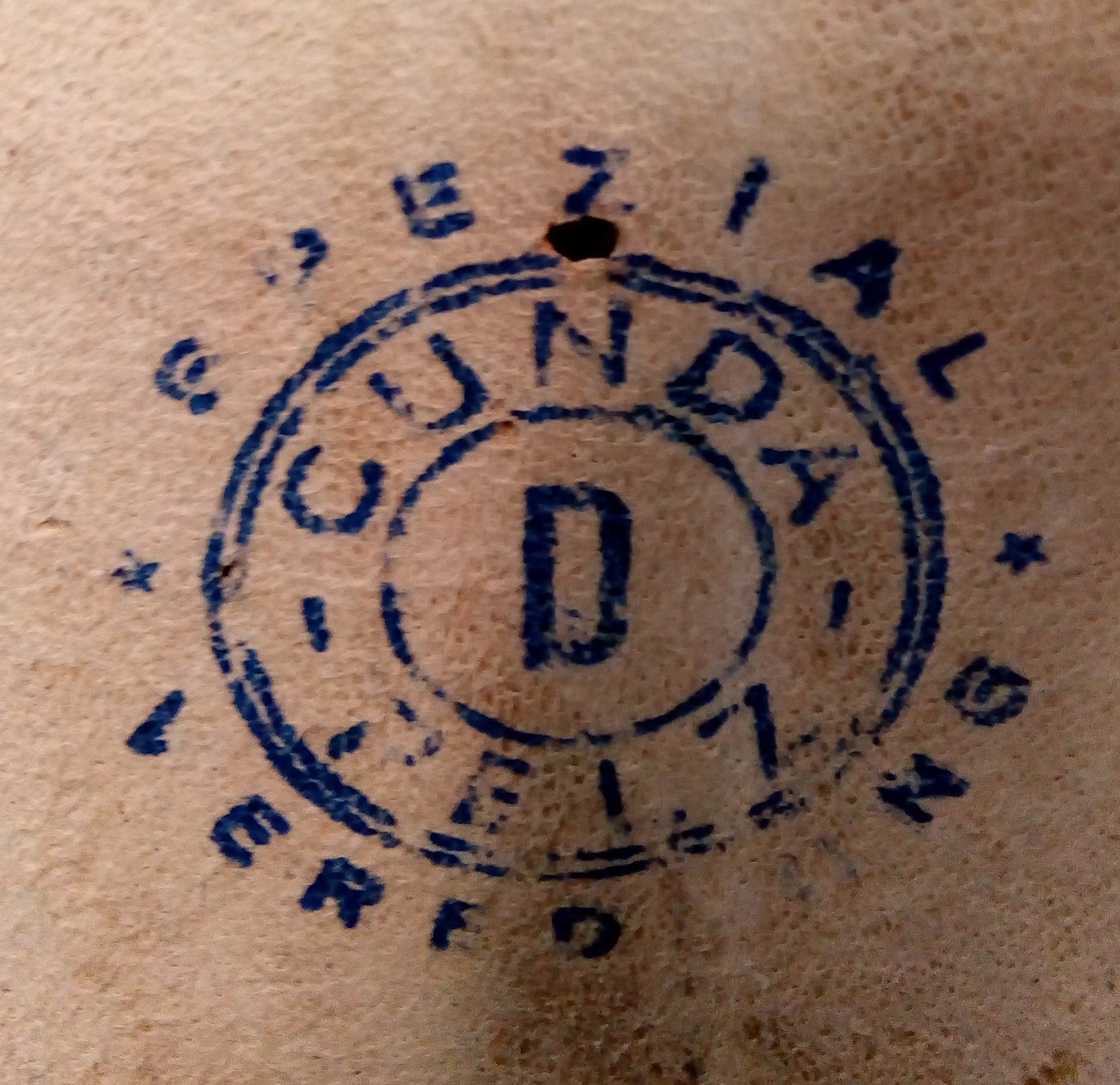 CUNDA Pelz Spezialveredlung. Fellstempel der Firma C & A auf der Rückseite einer alten Felltafel. Gesehen auf der Messe „Jagd & Hund“, Dortmund